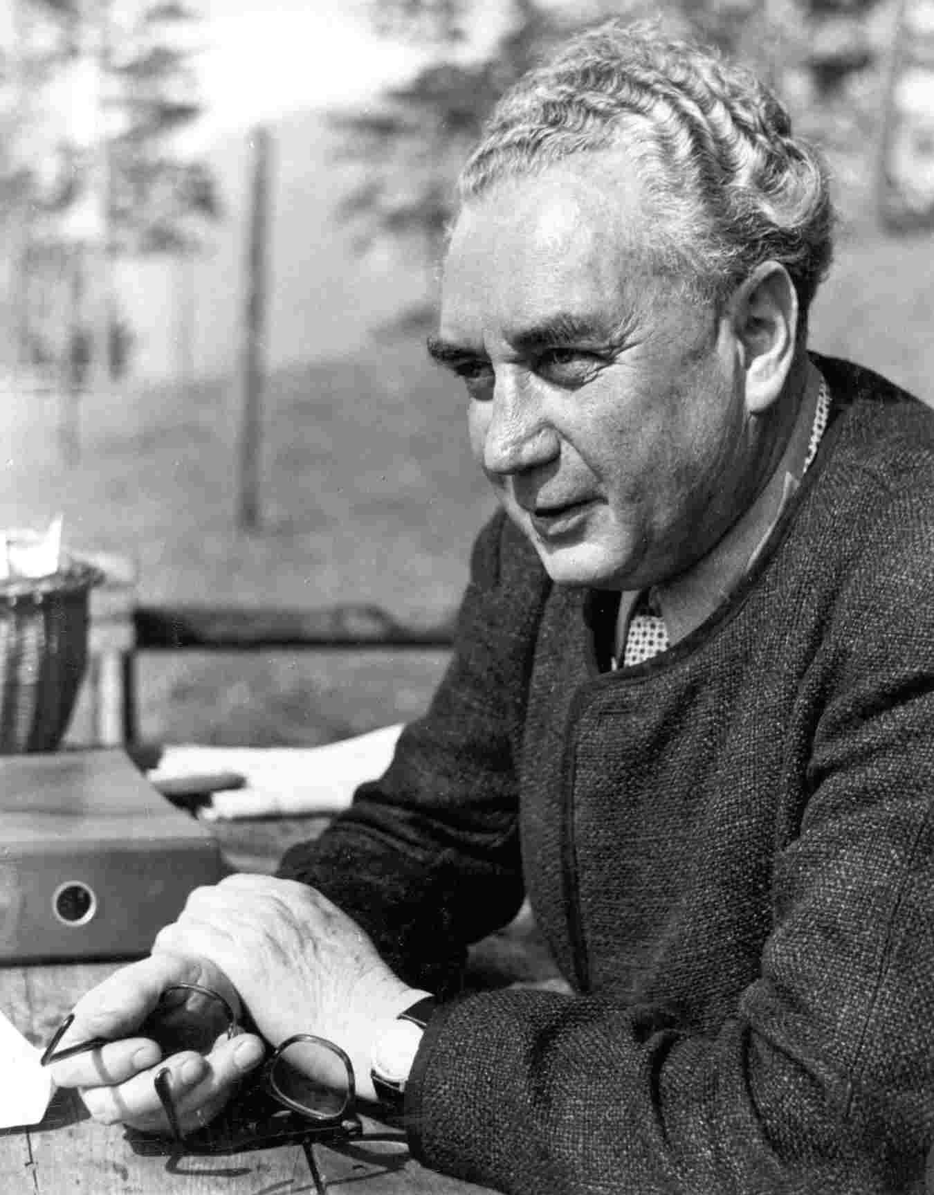 Werner Berg, Porträtfoto, 1964, Scann